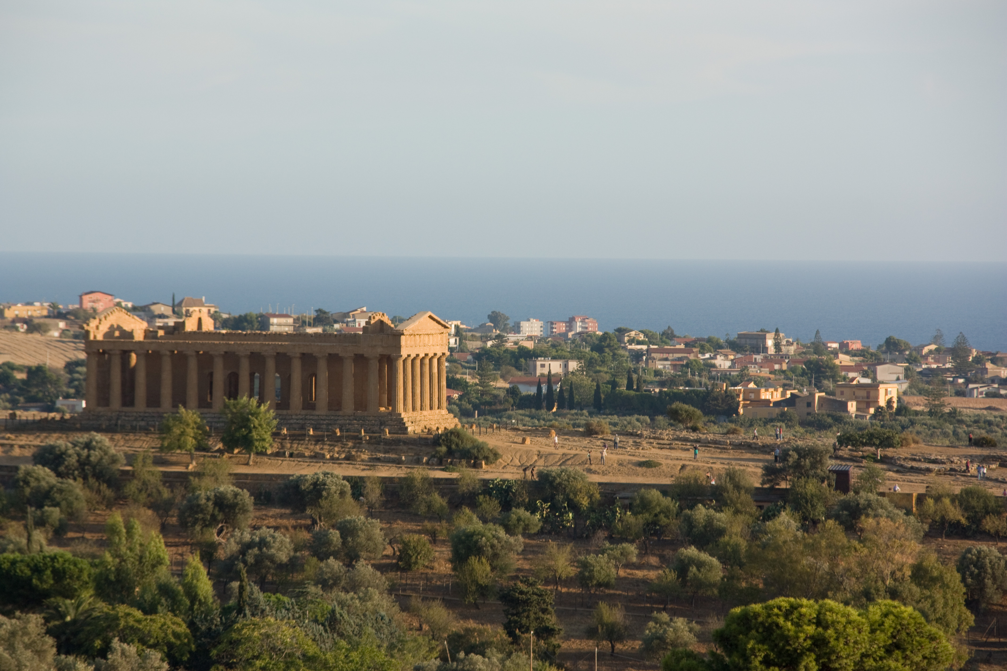 Tempio della Concorda (temple de de la Concorde) , Sicile, Italie